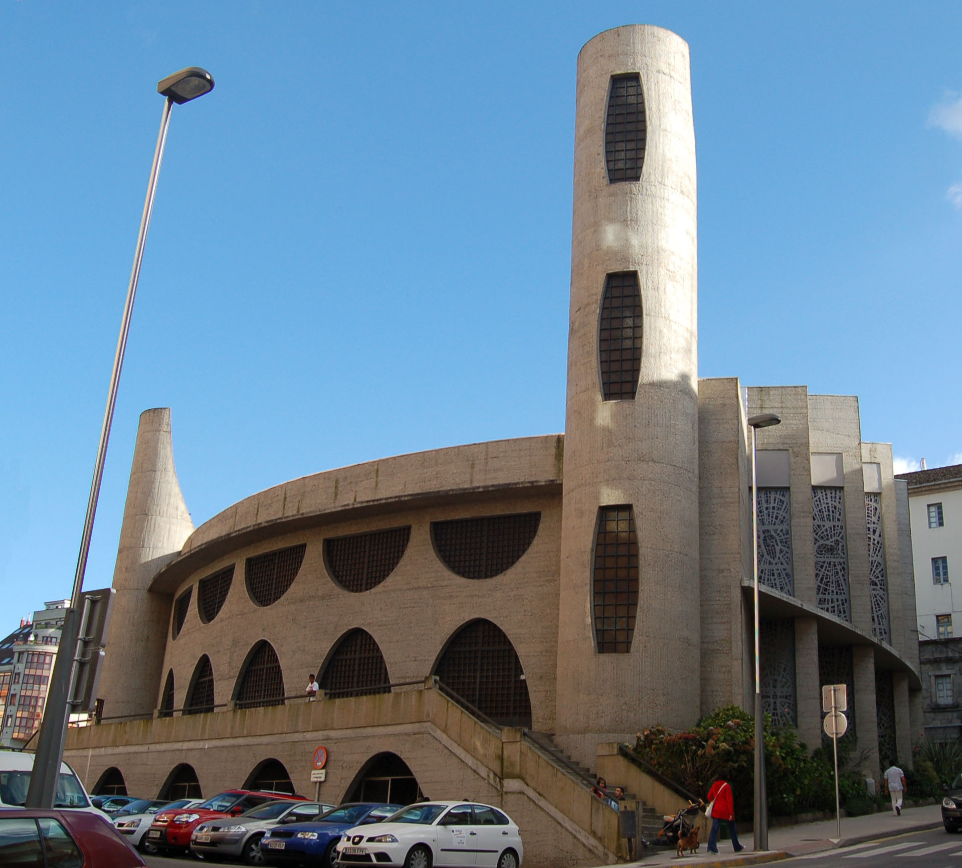 Igrexa parroquial da Virxe do Camiño (Pontevedra)